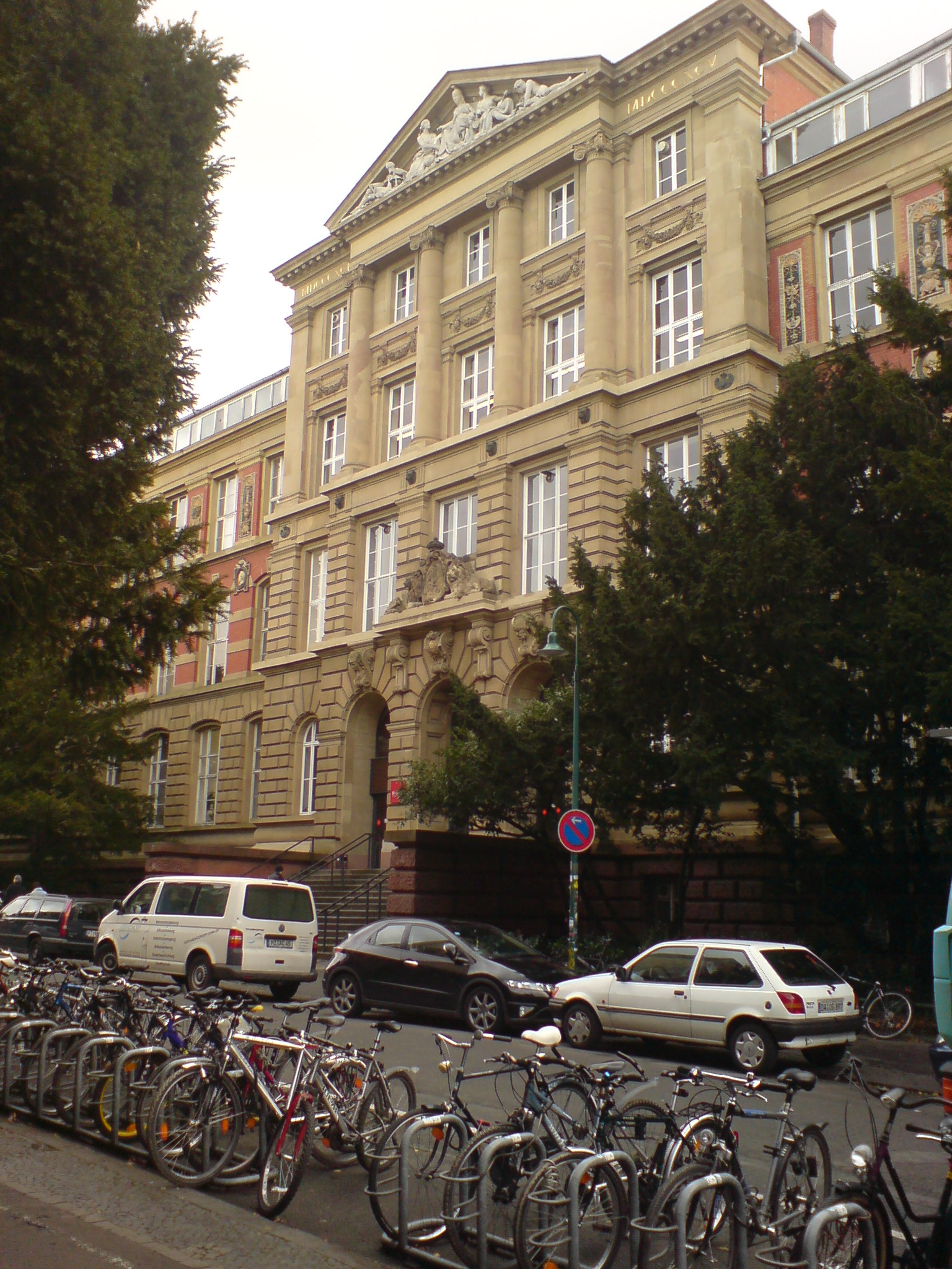 Altes Hauptgebäude der Universität